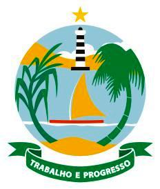 Brasão instituído em 22/03/2006 pela Lei Municipal n° 1.045/06